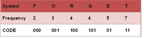 霍夫曼編碼結果